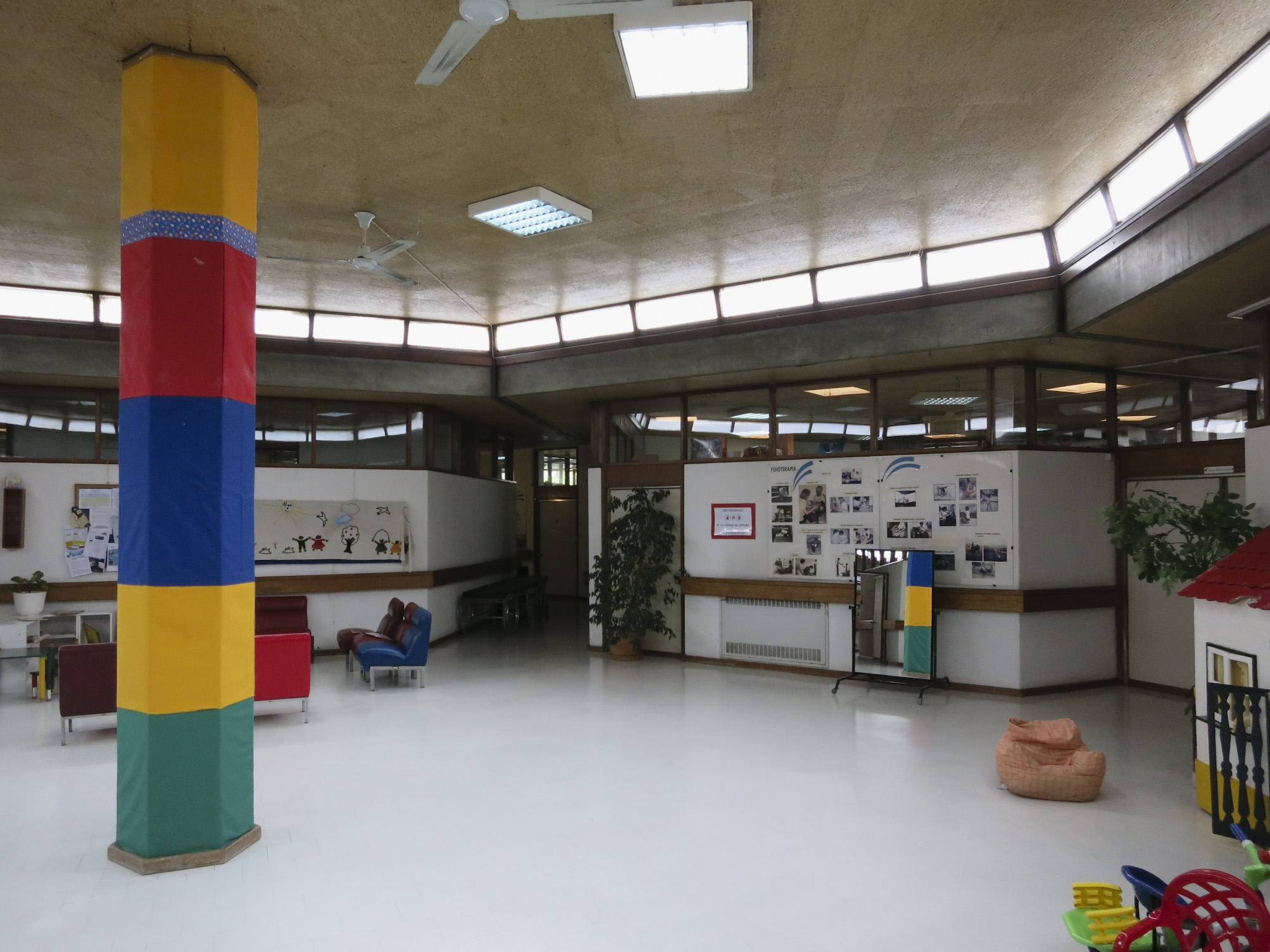 Palma de Melo, Centro de Reabilitação de Paralisia Cerebral Calouste Gulbenkian, Lisboa